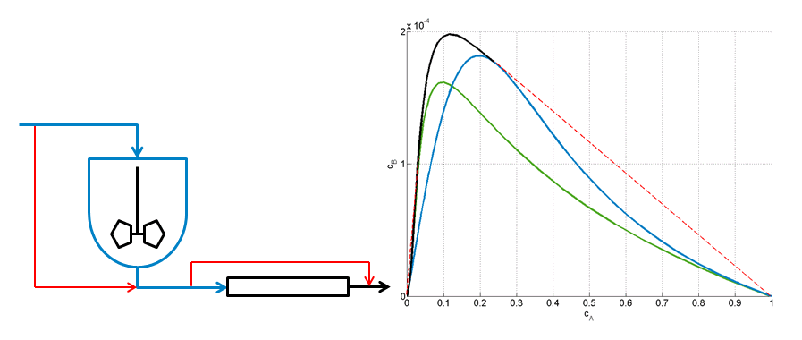 Erreichbares Gebiet